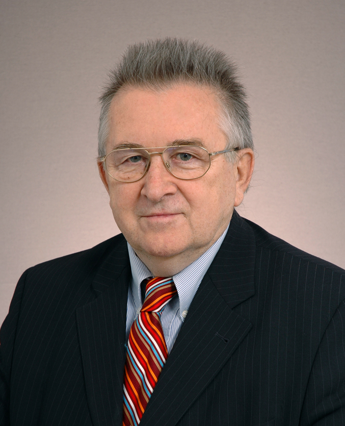 Senator Kazimierz Kutz